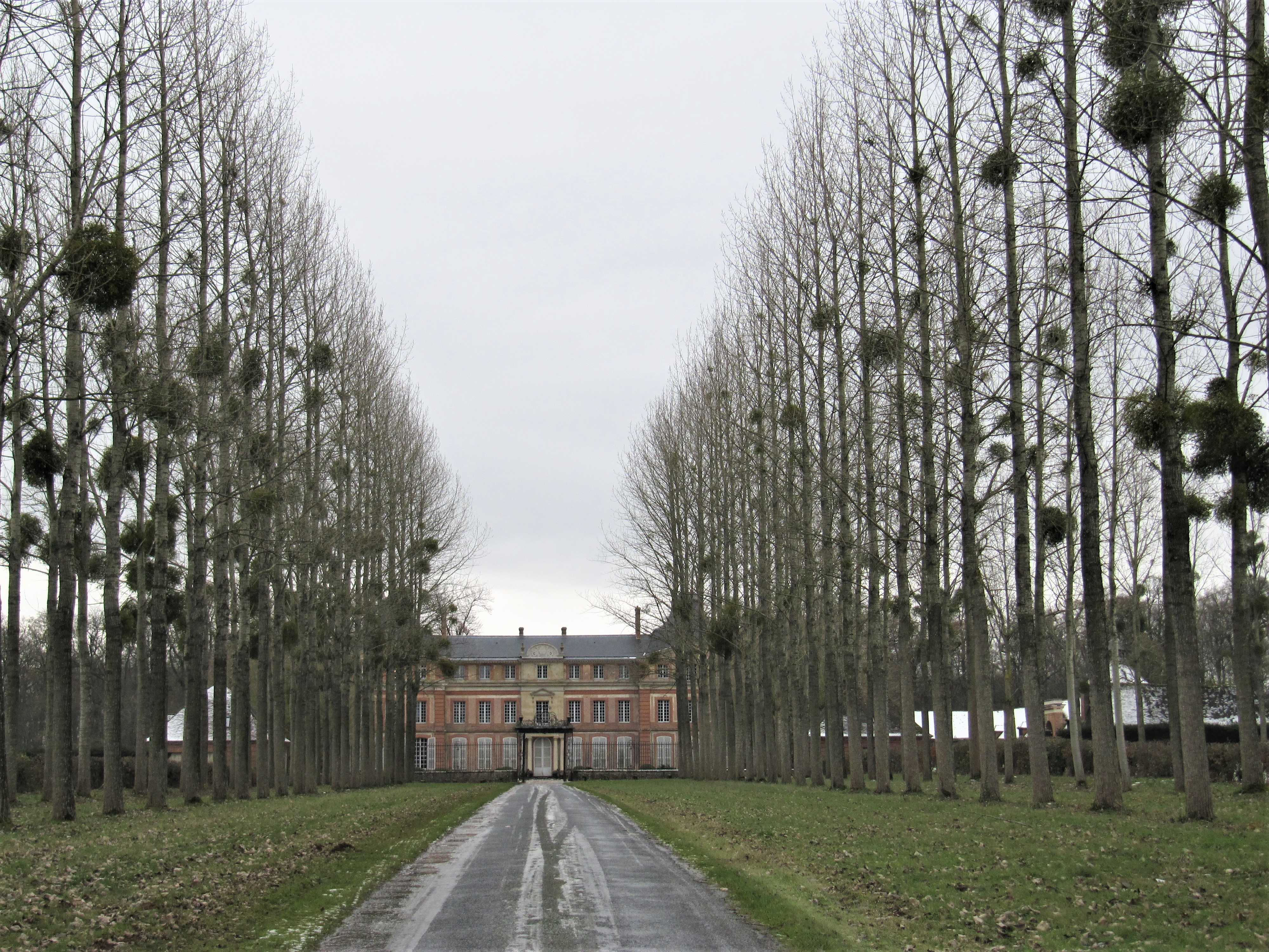 L'allée relie le château de la Hallière à la route de Châteauneuf-en-Thymerais à la ville du Mans